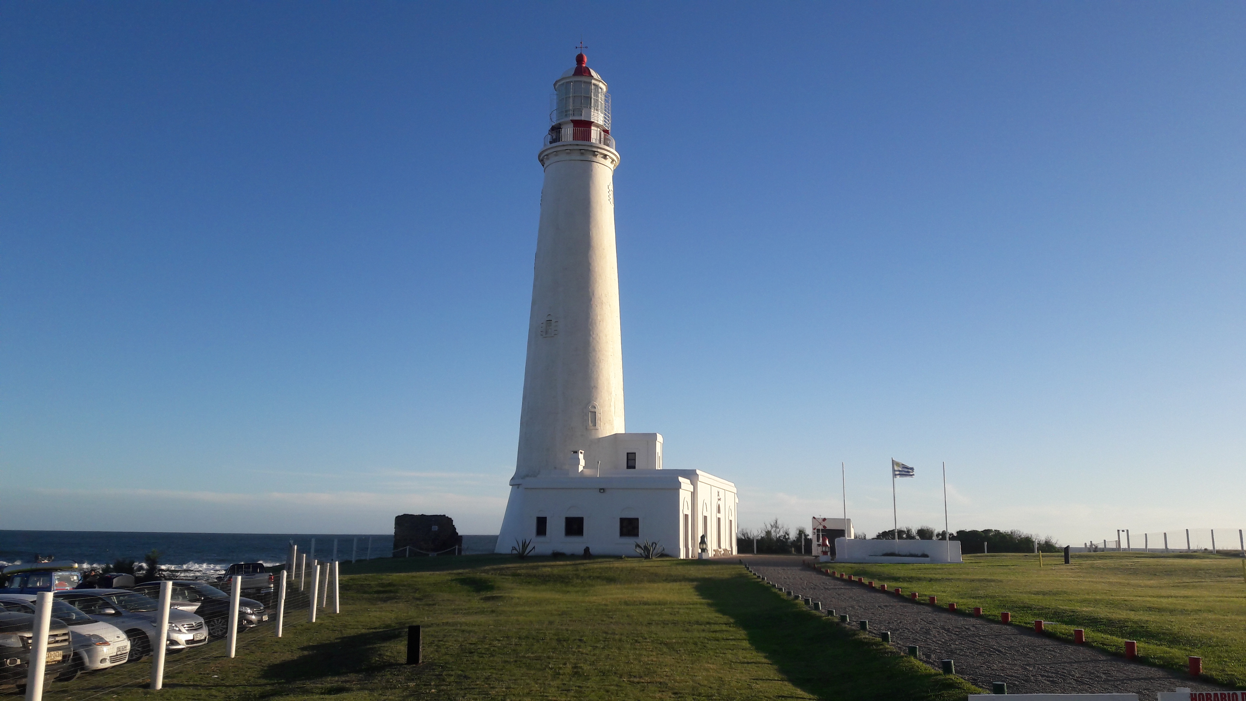 Faro de Cabo de Santa María, La Paloma, Rocha, Uruguay